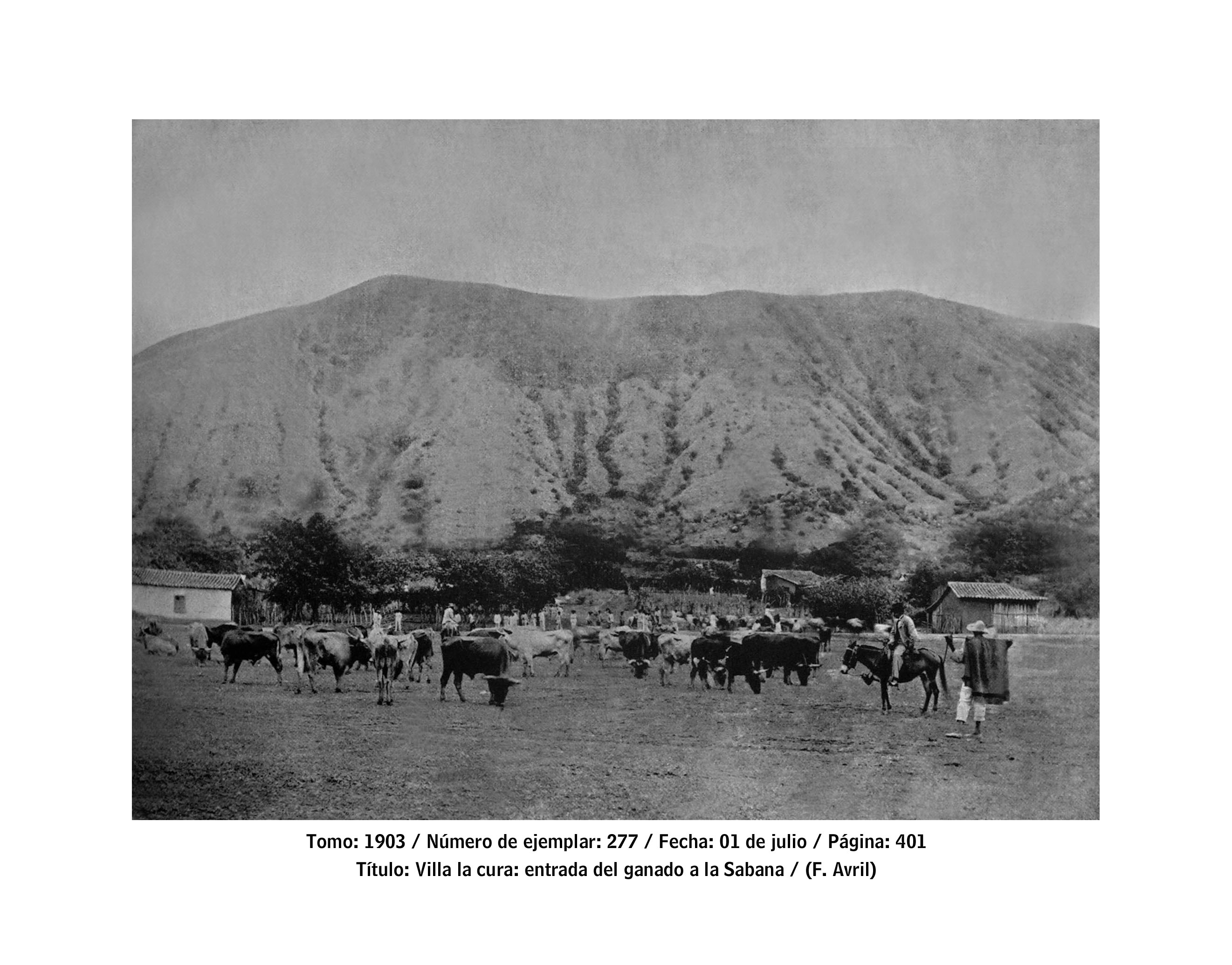 Foto de Henrique Avril